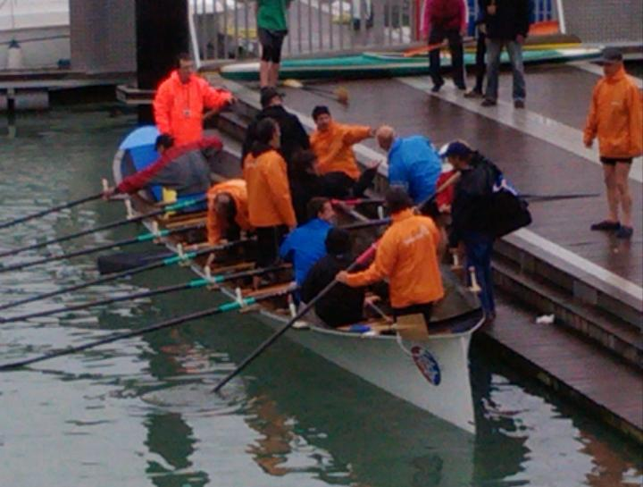 Fortuna arraun-elkarteko beteranoen trainerua, entrenamenduan.